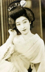 飯塚敏子 [1]